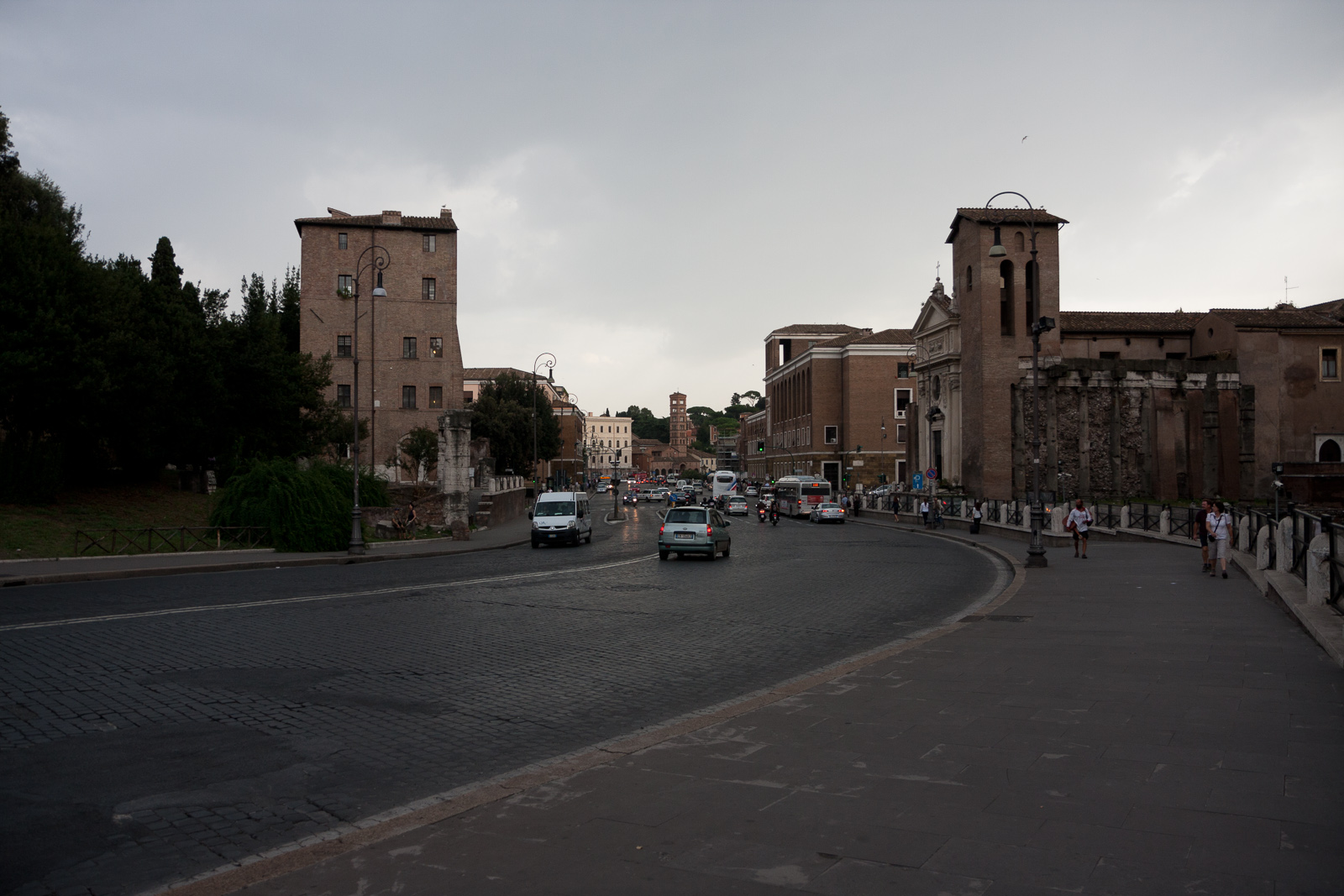 Rione XI Sant'Angelo, 00186 Roma, Italy